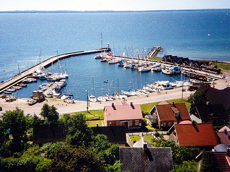 Hafen von Kyrkbacken auf der schwedischen Insel Ven im Öresund, im Hintergrund die Küste der dänischen Insel Seeland bei Rungsted